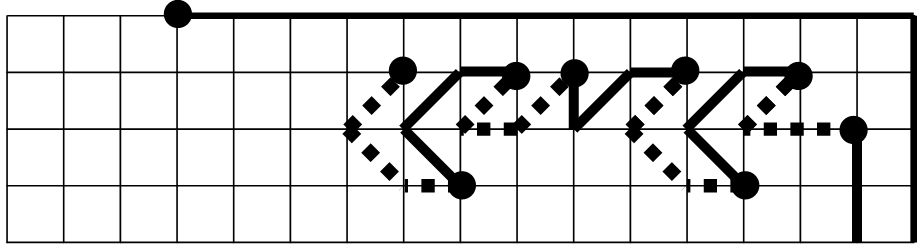 Горизонтальная цепочка вынужденных ходов. Из издания "Мациевский С. В. Математическая культура. Игры: Учебное пособие. — Калининград: Изд-во Калининградского государственного университета, 2003. — 120 с., ил. — ISBN 5-88874-451-4. — Глава 4. Игры и головоломки. § 2. Футбол."